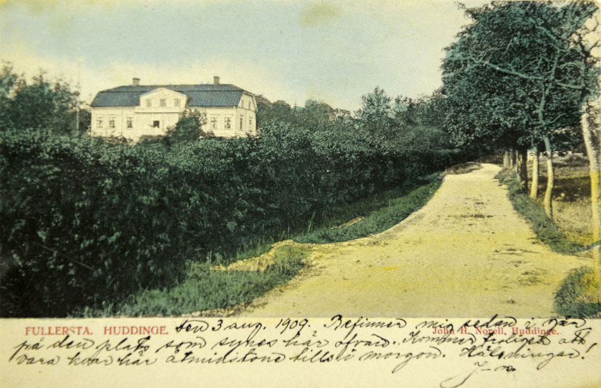 Gammalt gulnat och handkolorerat vykort med bild av Fullersta Gård